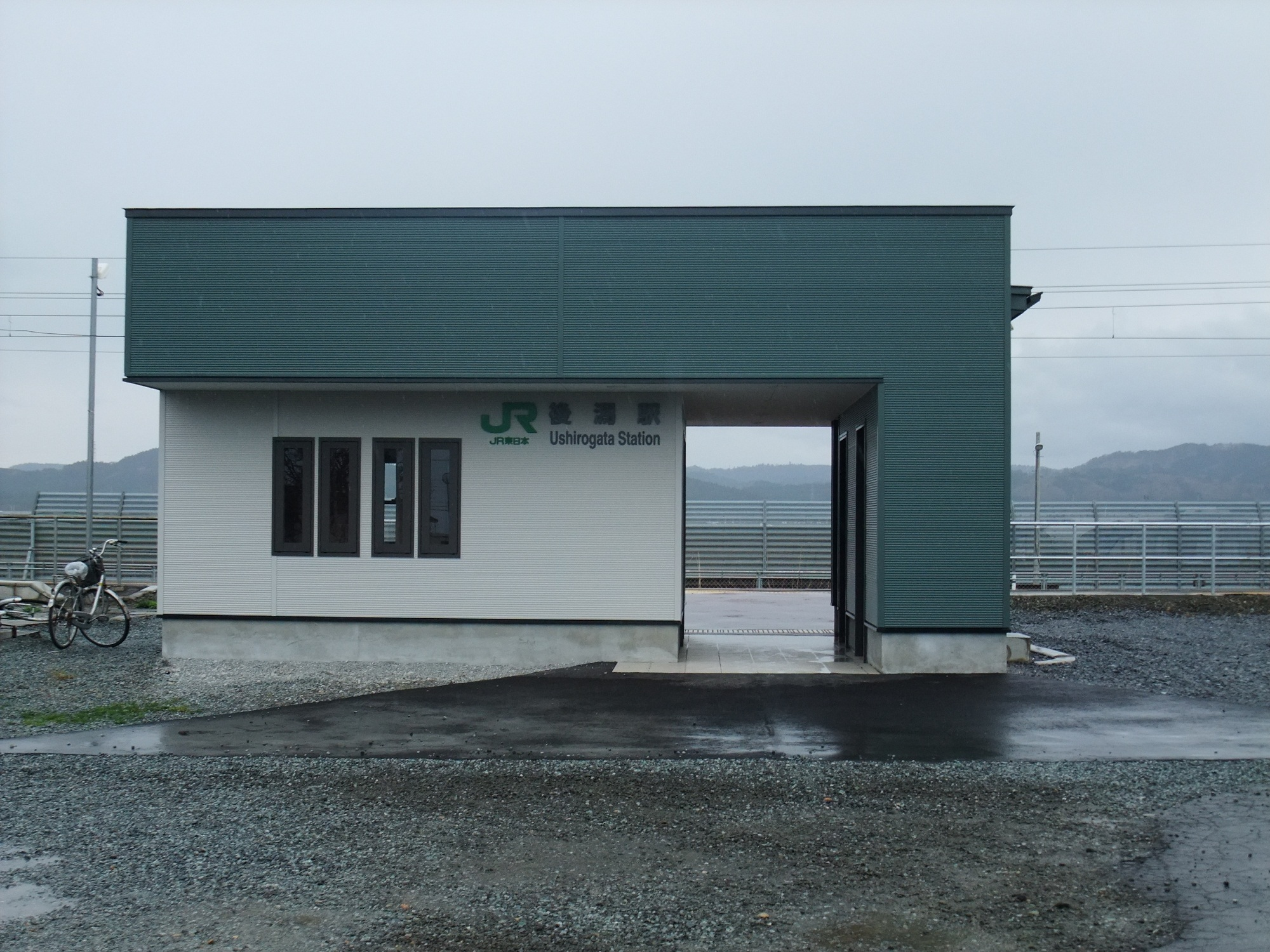 津軽線後潟駅